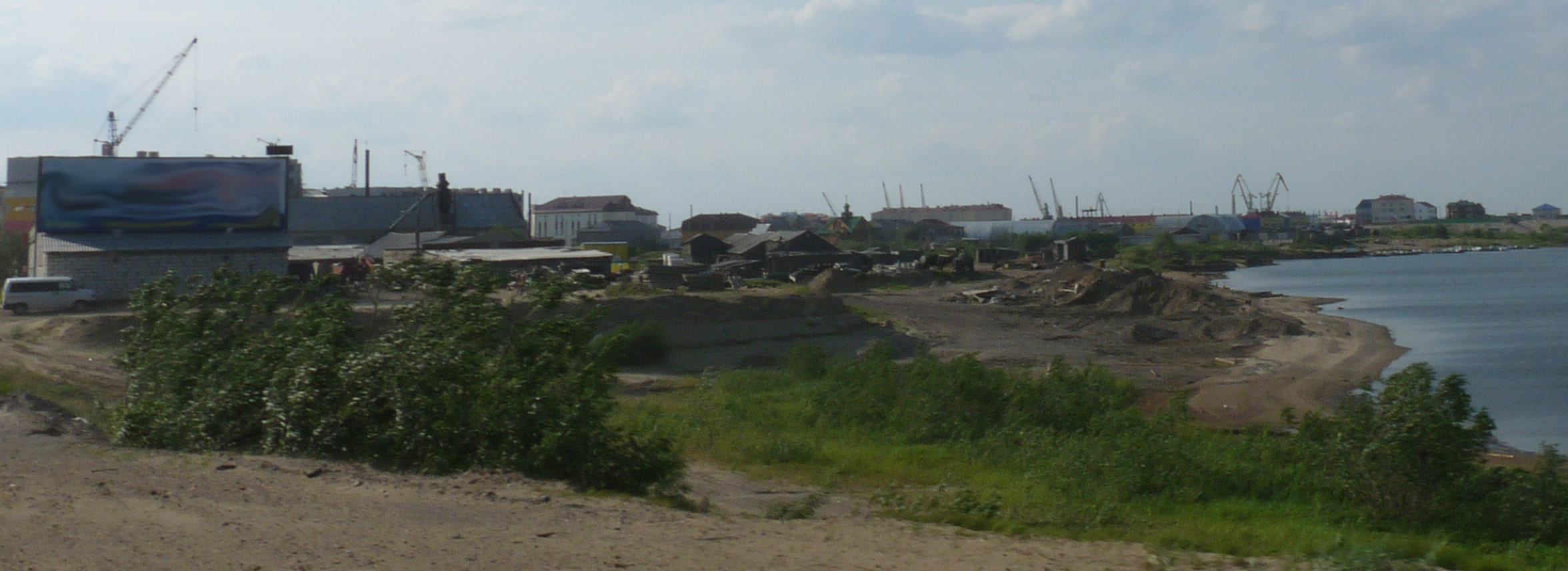 Вид на город со стороны городской Курьи